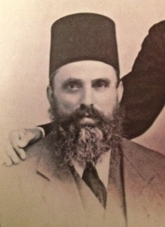 תמונתו של נסים קורקידי מתוך אלבום משפחתי.